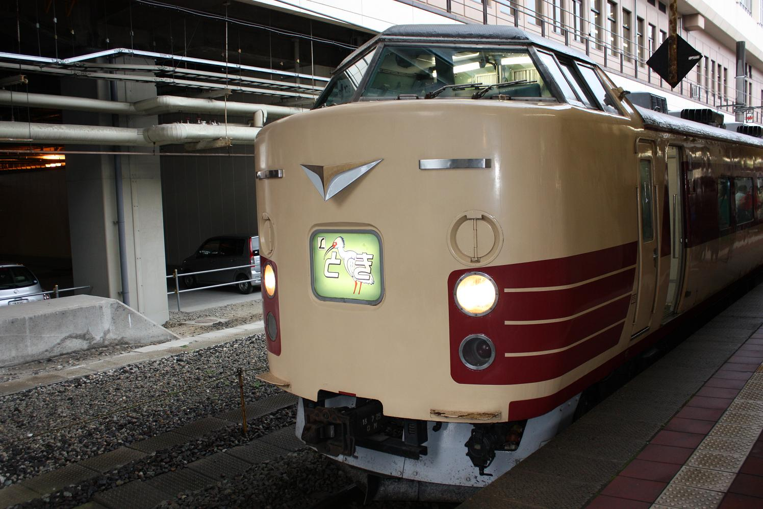 懐かしの特急「とき」号（新潟デスティネーションキャンペーン記念イベント）